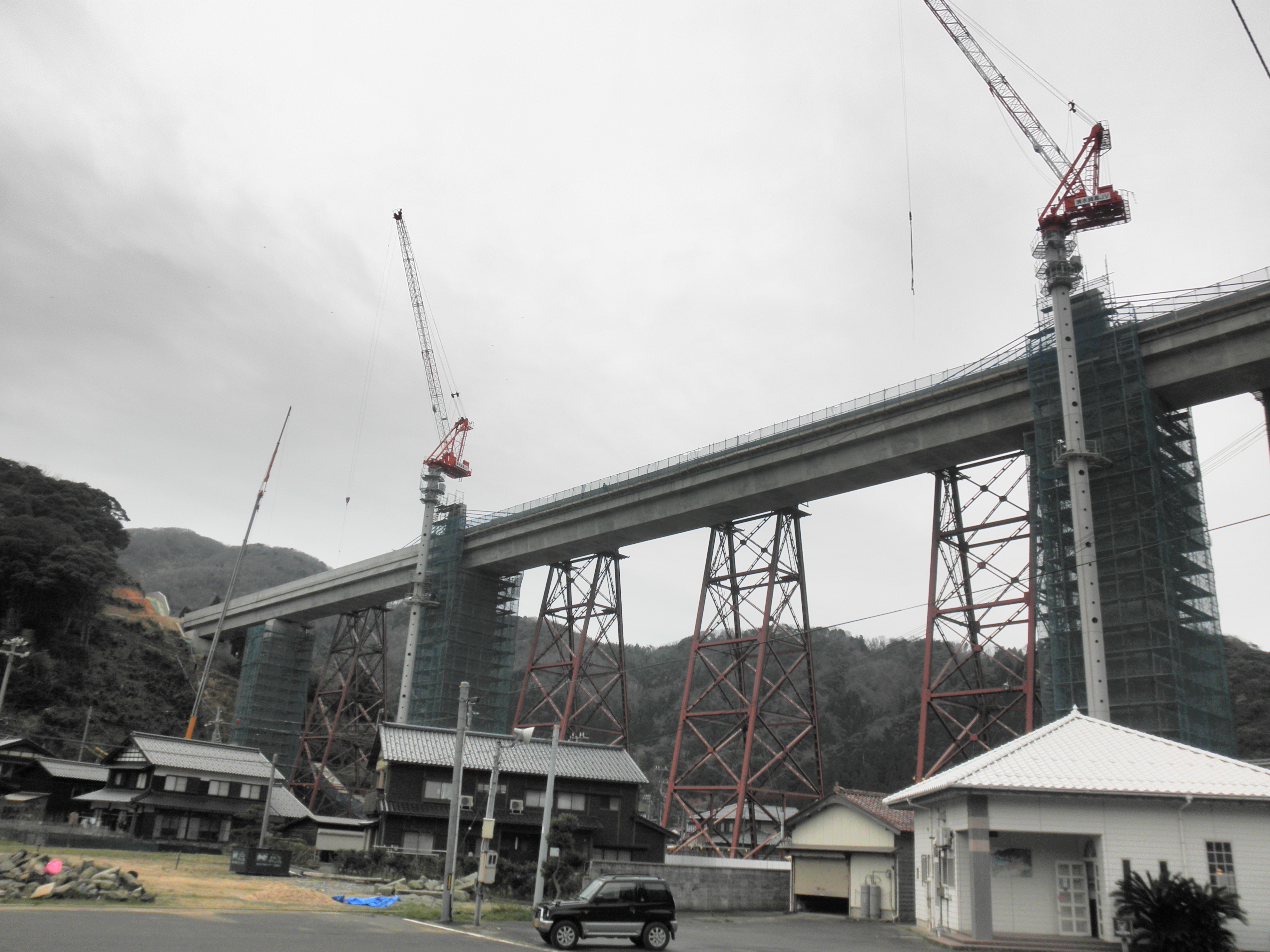 現在建設が進められている新余部橋りょう(山側より撮影)。